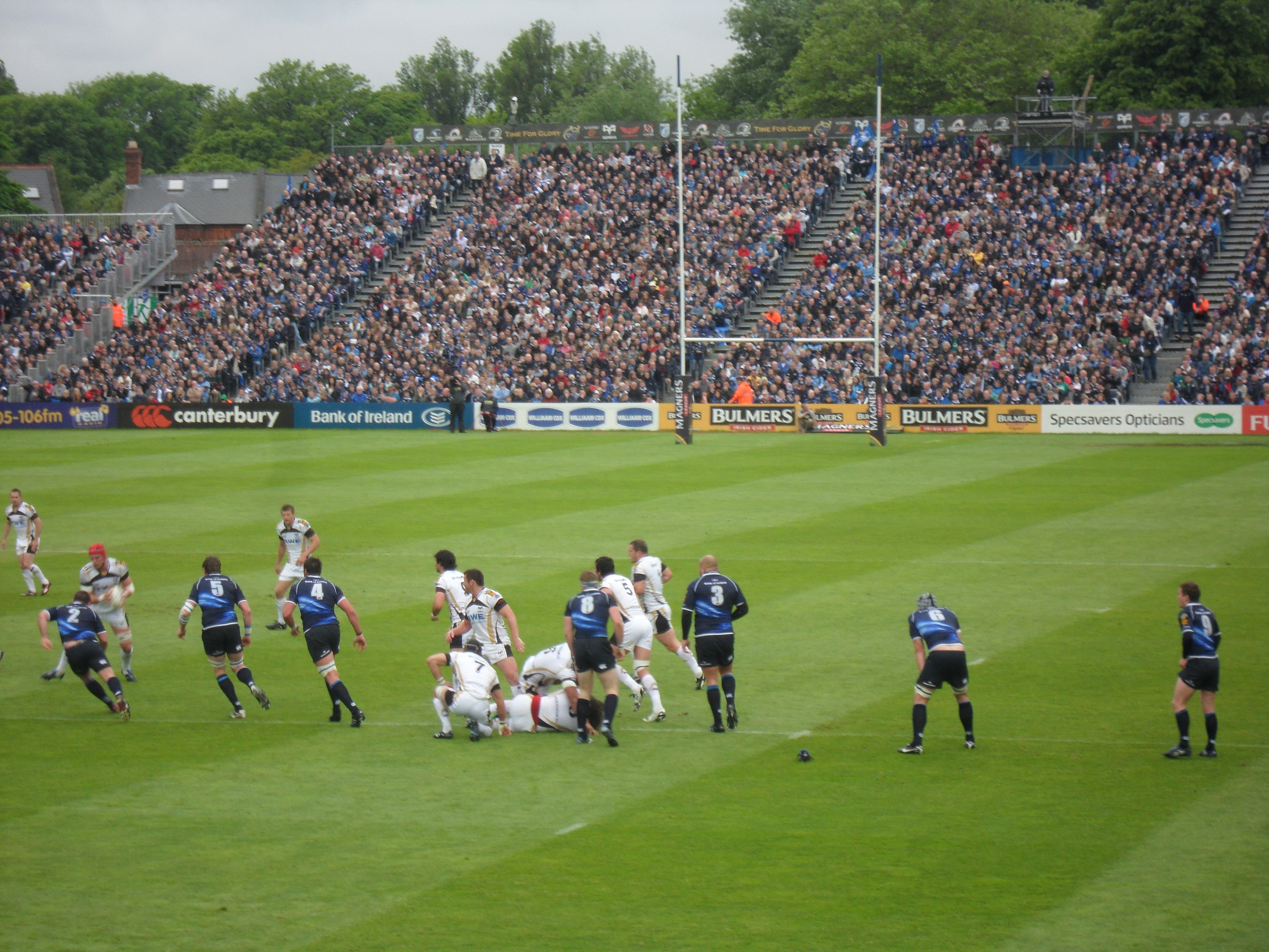 Leinster Rugby vs Ospreys. 29 may 2010 Ospreys 17 - 12 Leinster at RDS Arena, Dublin.